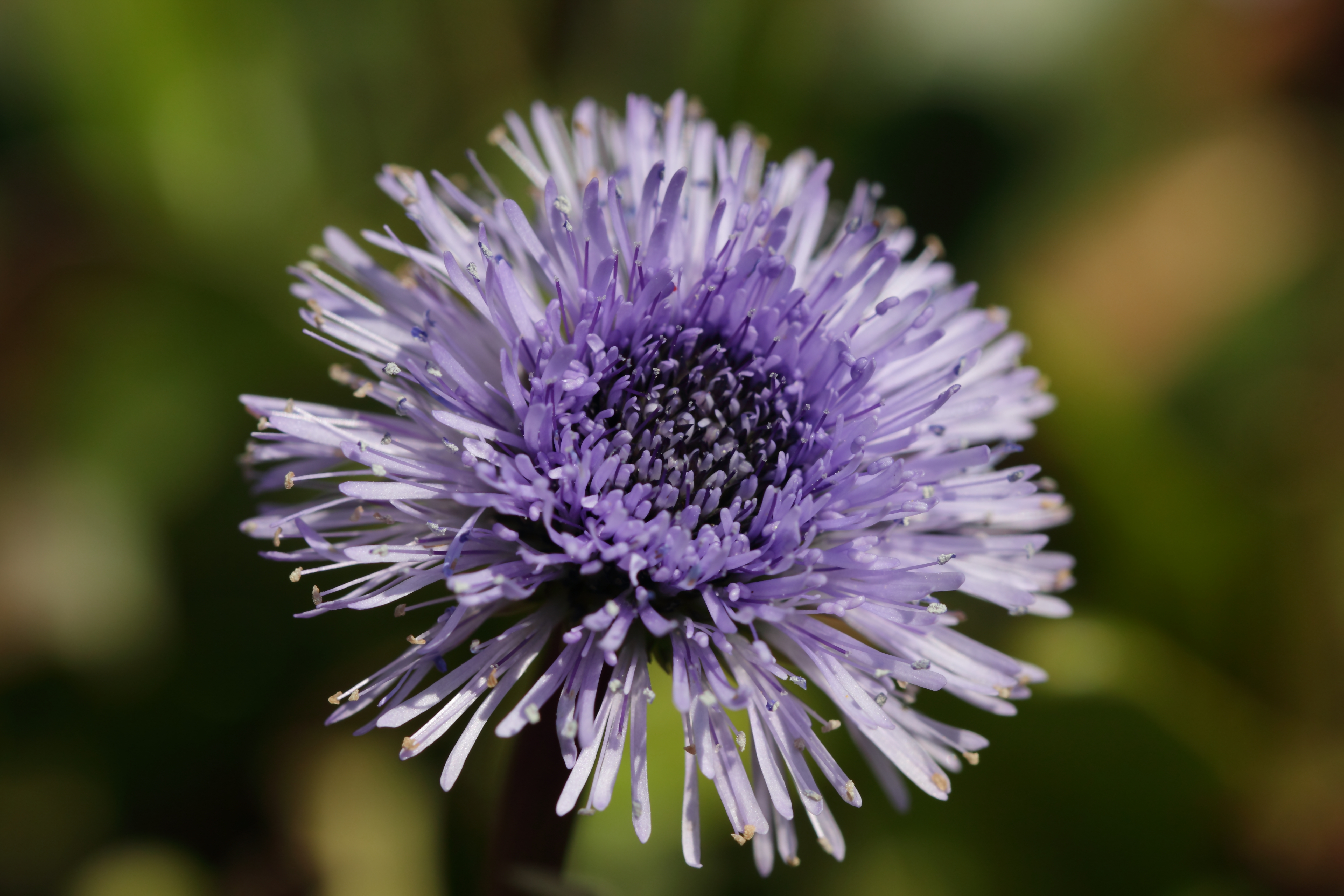 Nackte Kugelblume im Botanischen Garten der Universität Wien.